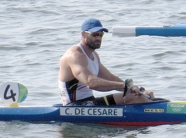 Rio 2016. Canoagem de velocidade.sx 05